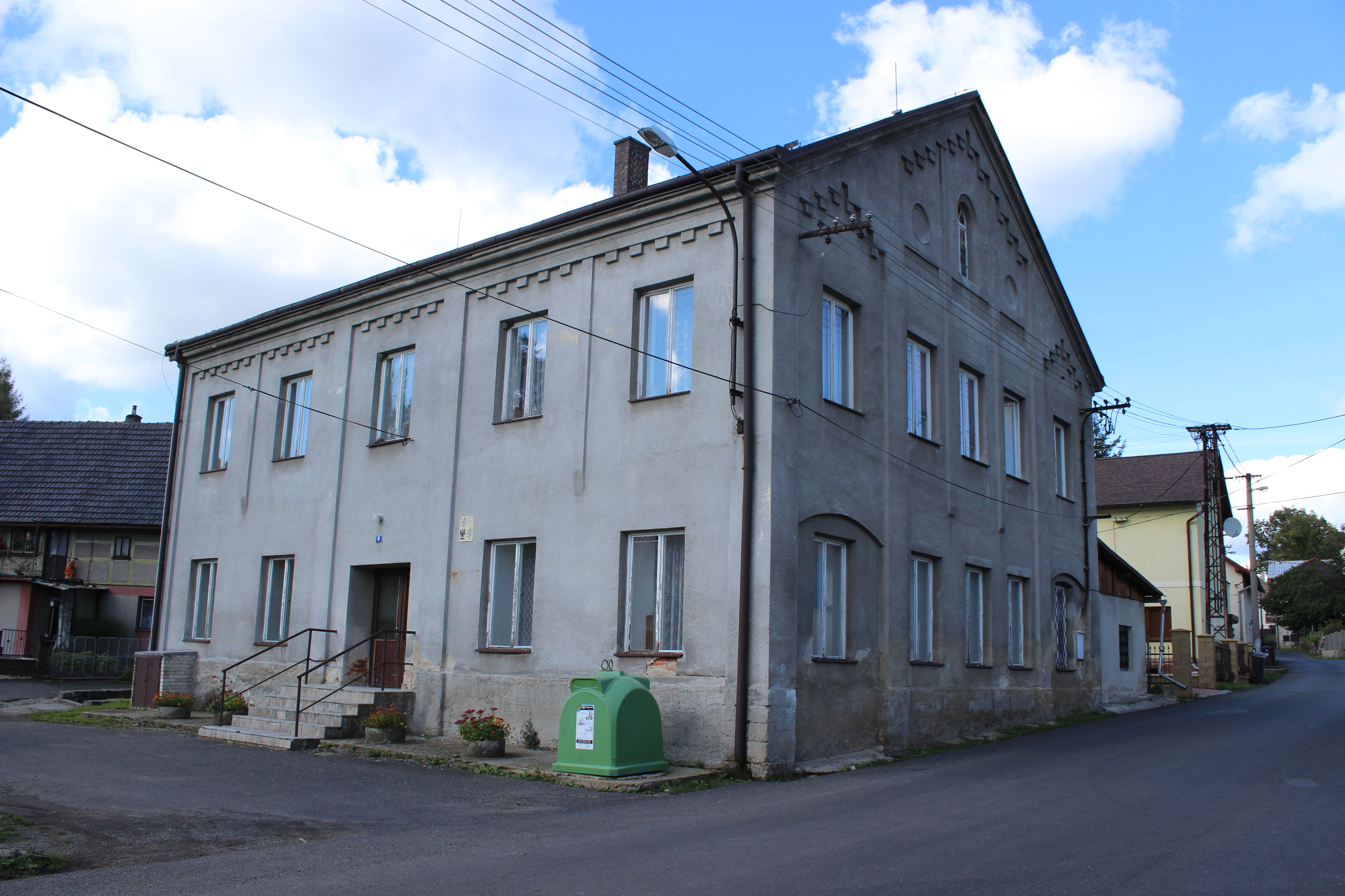 Dům číslo popisné 45 v Dobrné.